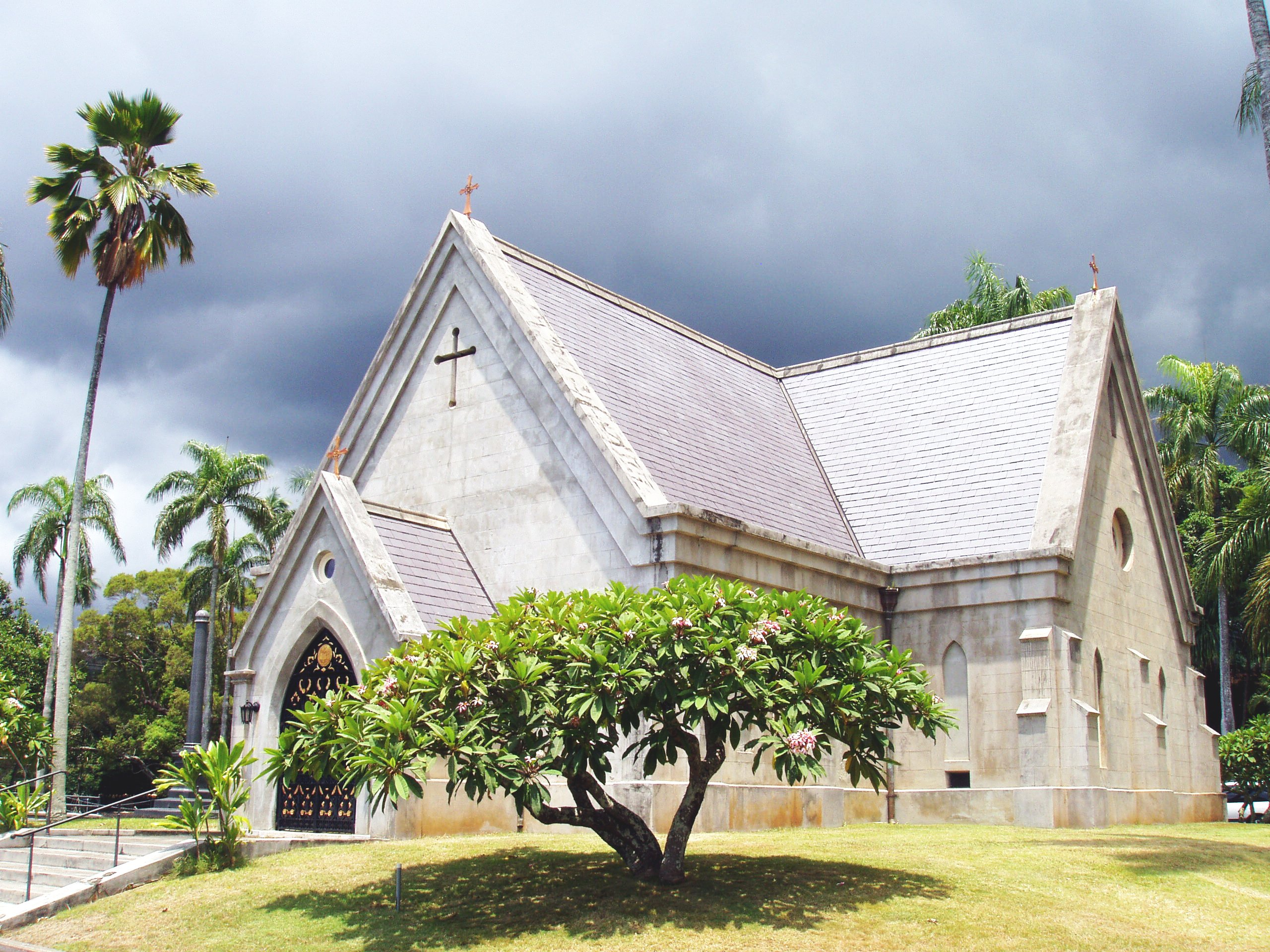 Chapel - Royal Mausoleum, Honolulu, Hawaii, USA.